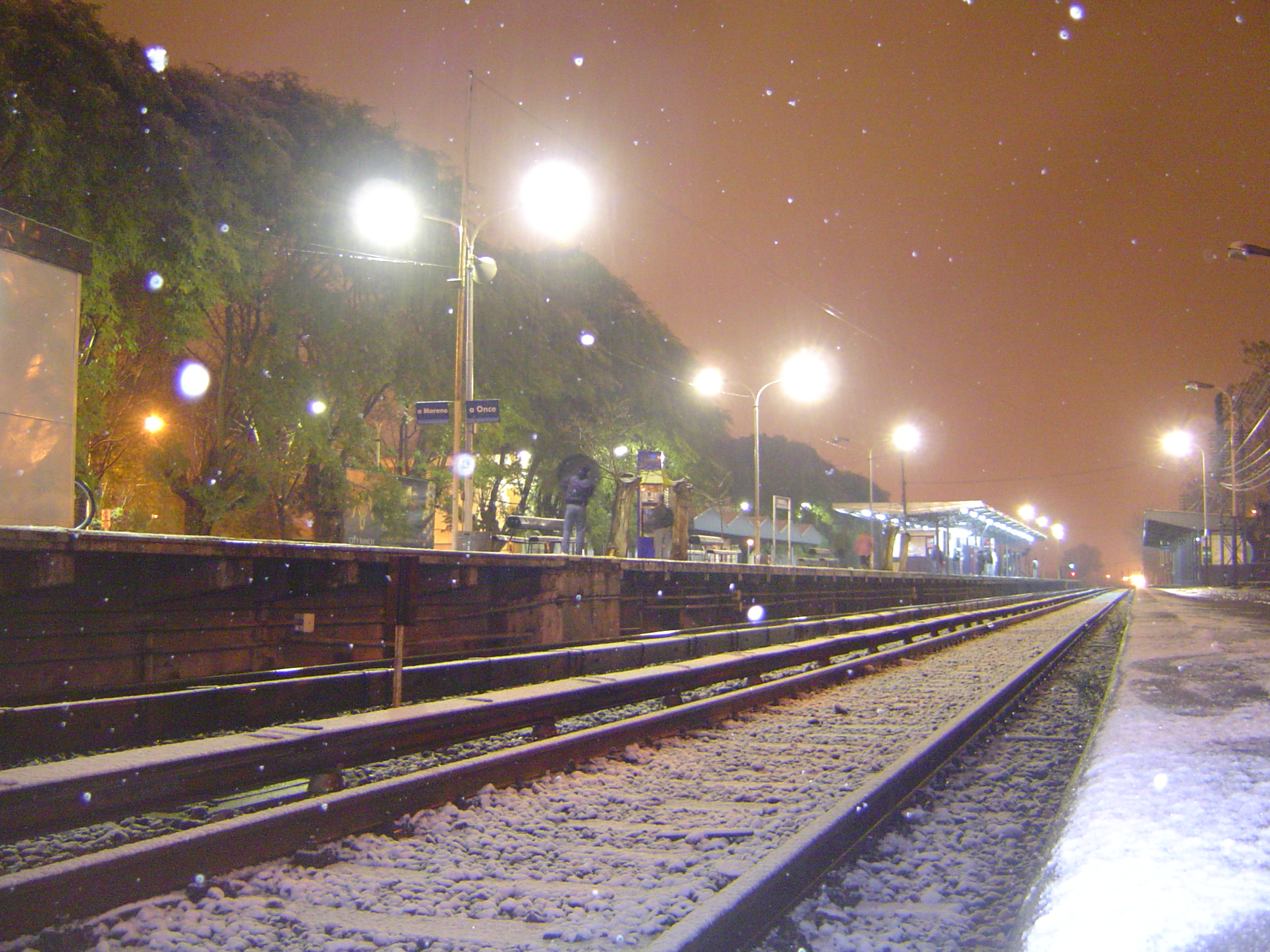 Estación Haedo durante la nevada del 9 de julio de 2007